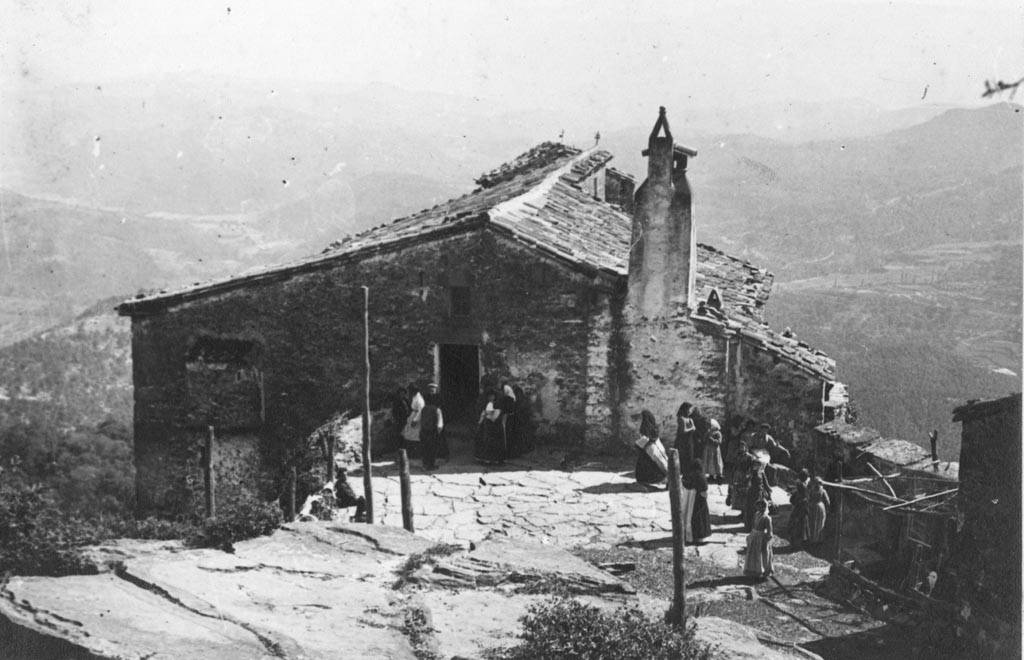 Dones a l'entrada del Santuari de Santa Maria de Finestres. Cèsar August Torras i Ferreri (Entre 1890 i 1923)